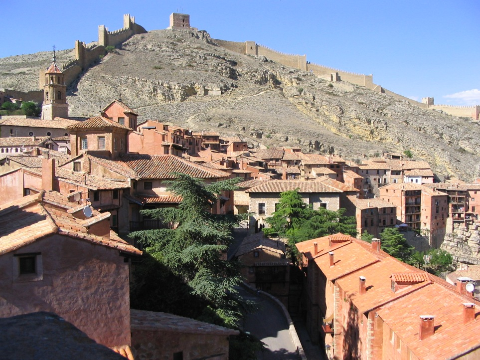 Albarracín, provincia de Teruel, Aragón, España.